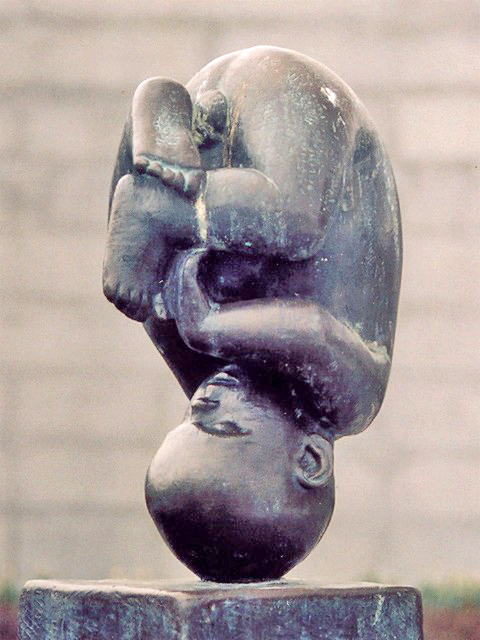 Gustav Vigeland:"Foetus"